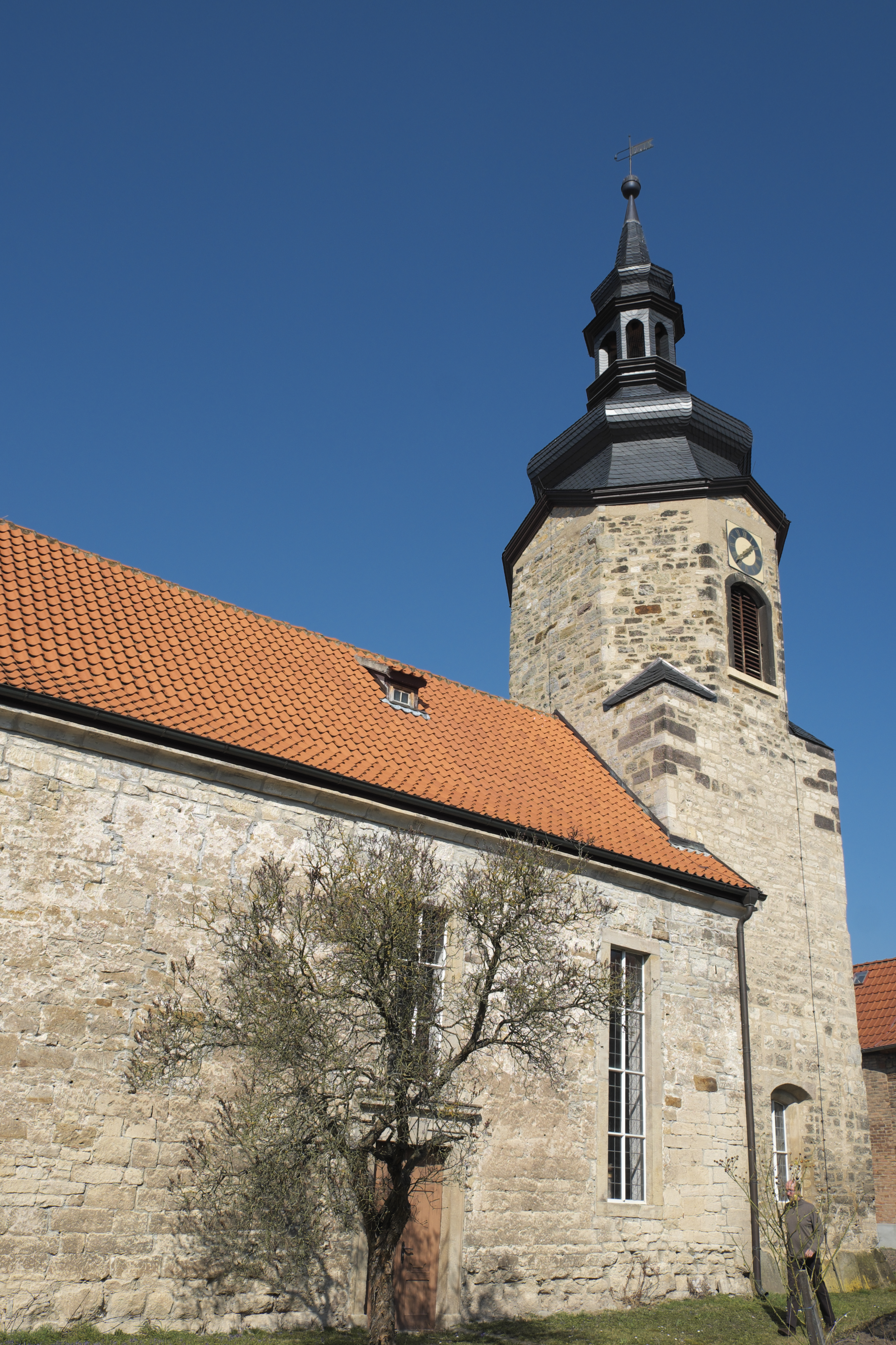 Kirche in Dorndorf, einem Stadtteil von Laucha an der Unstrut im Burgenlandkreis in Sachsen-Anhalt/Deutschland